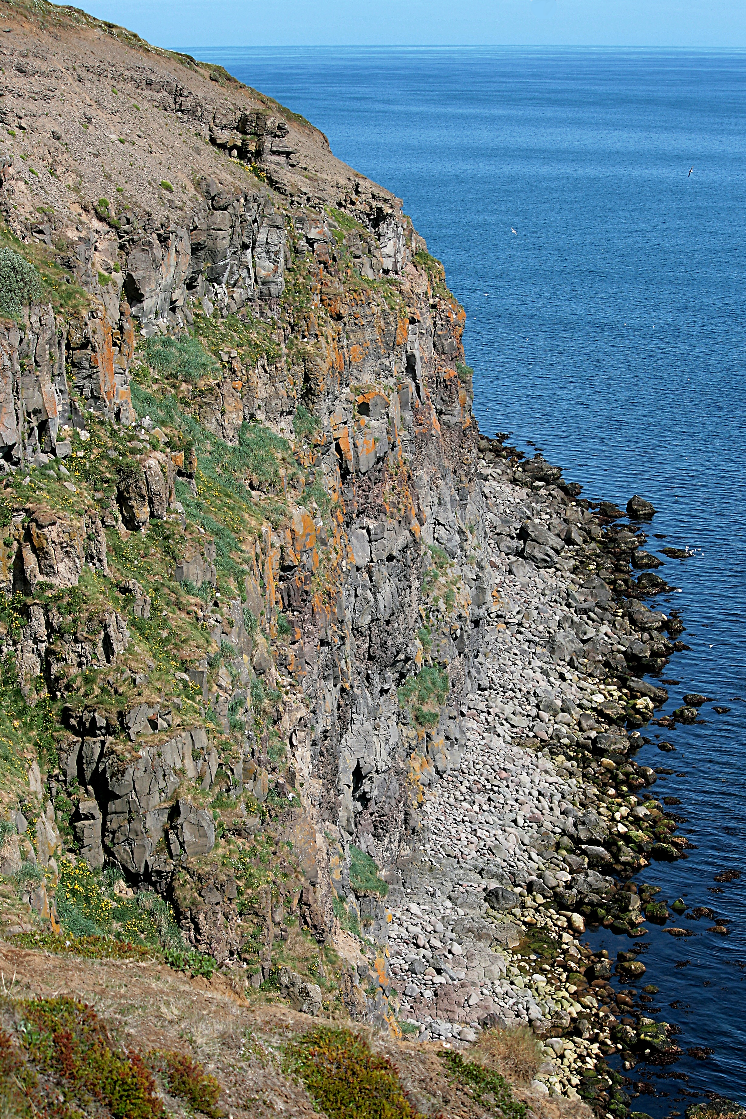 Steilküste, Vogelparadies: Halbinsel_Tjörnes